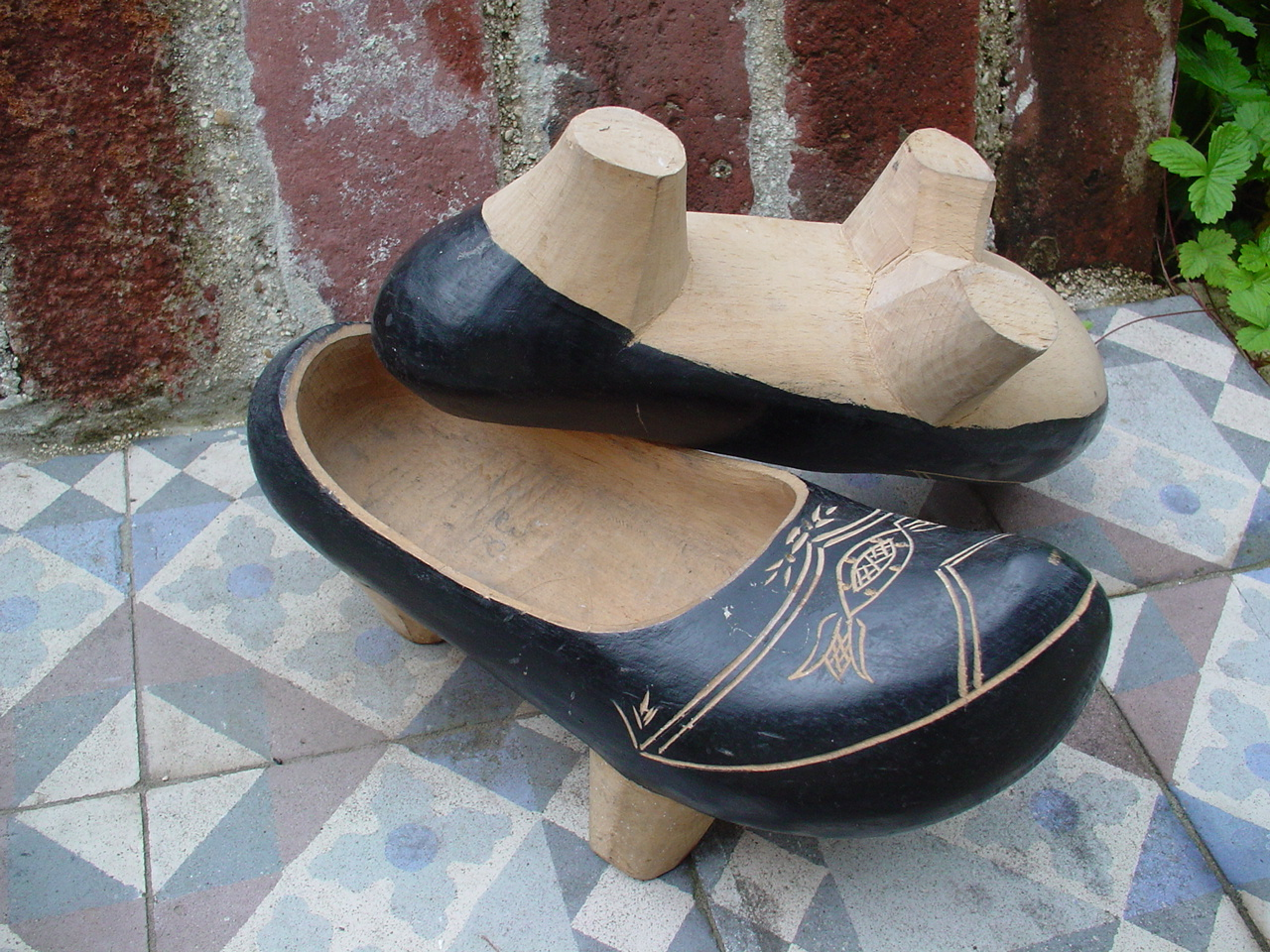 Albarcas de Cantabria